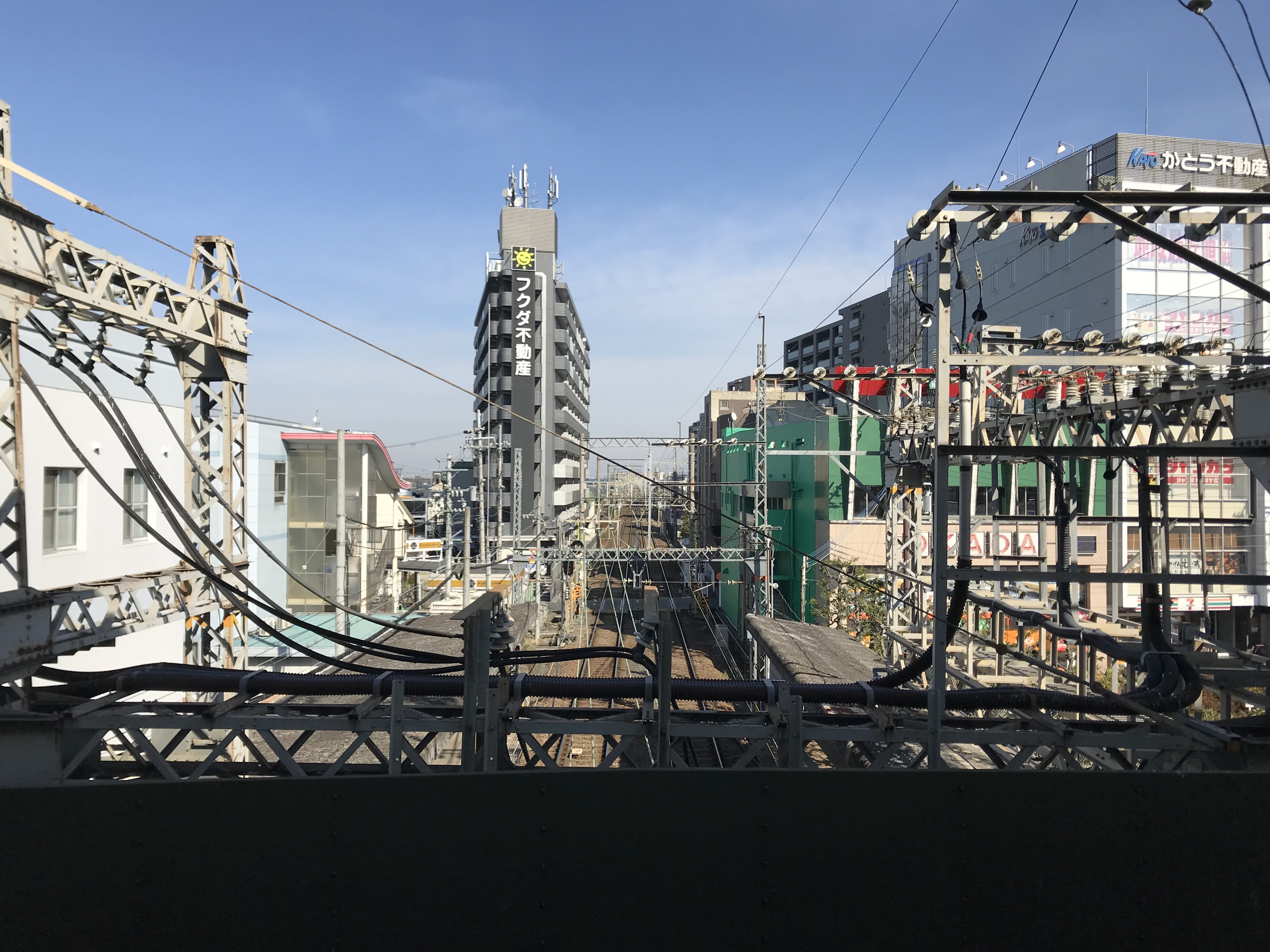 大和八木駅の大阪線ホームより望む橿原線ホーム(奥は新ノ口方面)